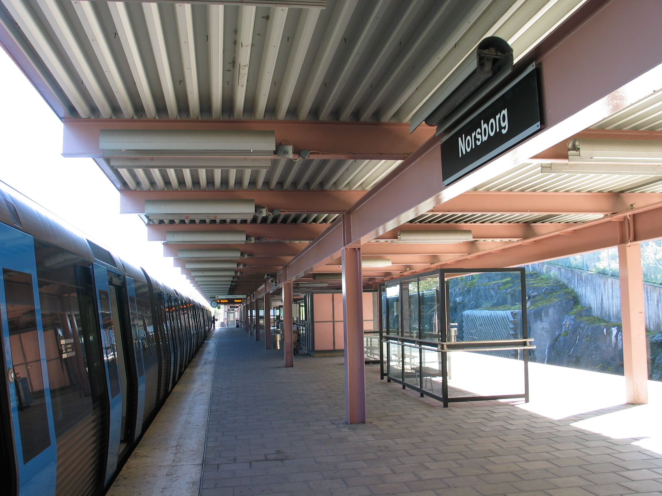 Norsborg, a metro station in Stockholm, Sweden.